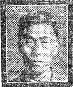 한국의 정치인 유억겸 (1947년)